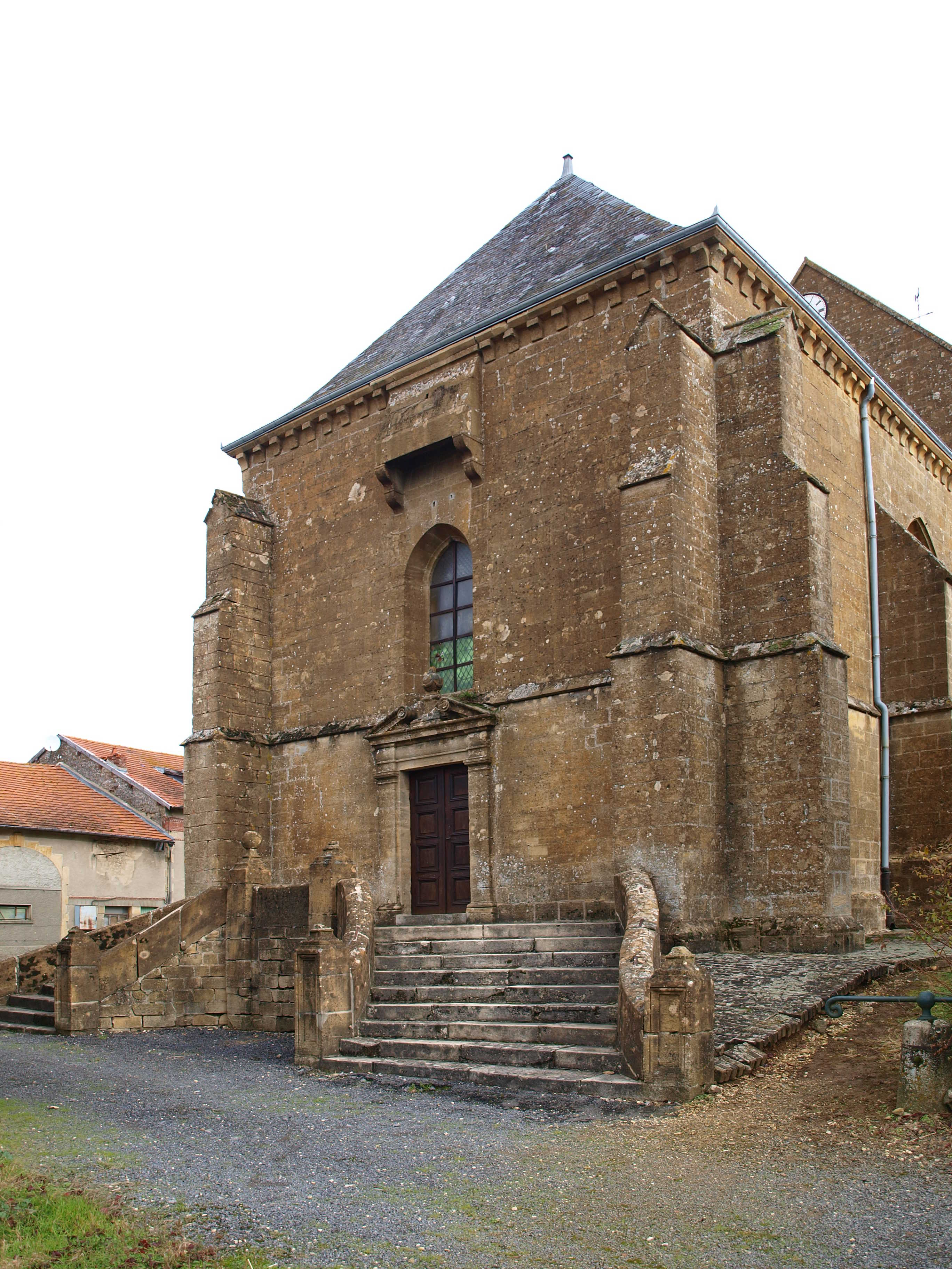 Authe (Ardennes, France) ; Église Saint-Martin